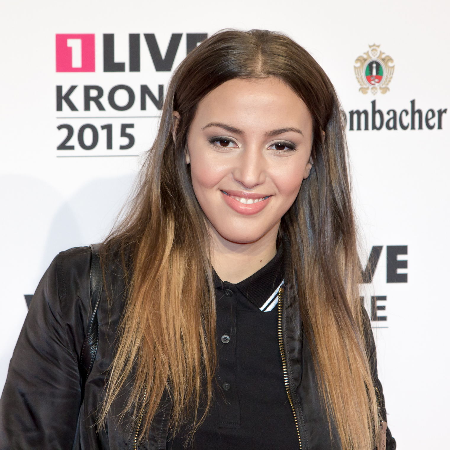 1liVE Krone 2015 - Namika